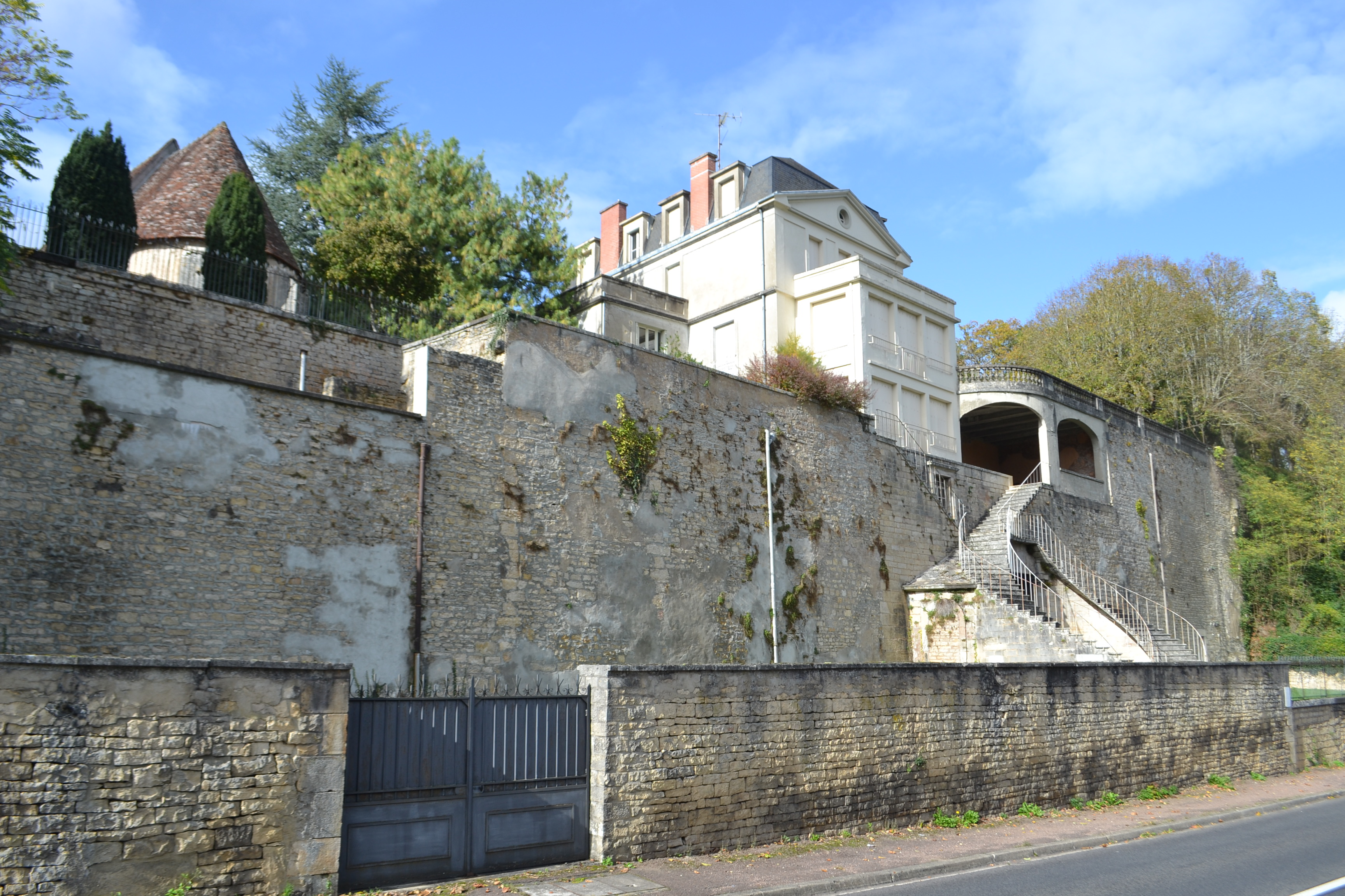 Château des Terrasses, Armes (Nièvre).